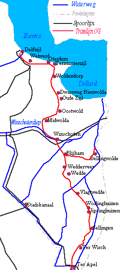 Zelfgemaakte kaart met de tramlijnen van Stoomtramweg-Maatschappij Oostelijk Groningen